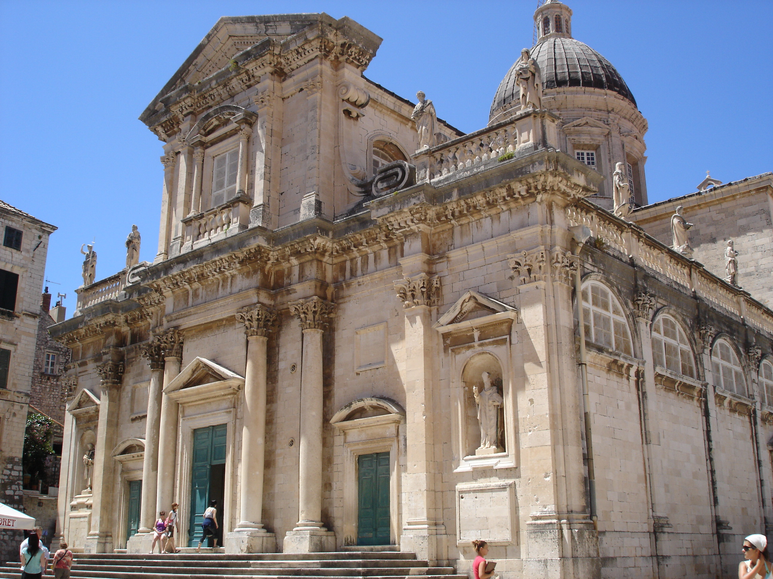 Dubrovnik